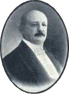 Leon Bondy - rakouský a český podnikatel